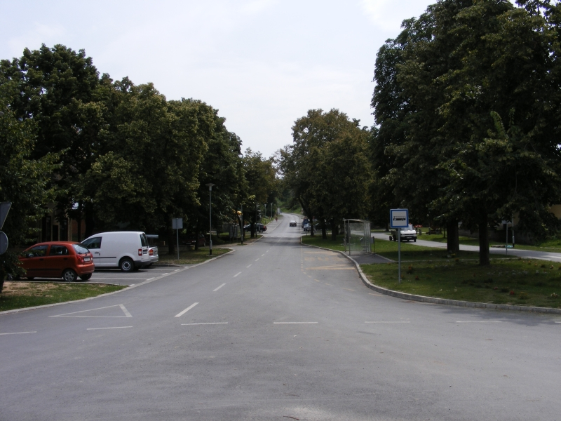 Glavna cesta u Aljmašu